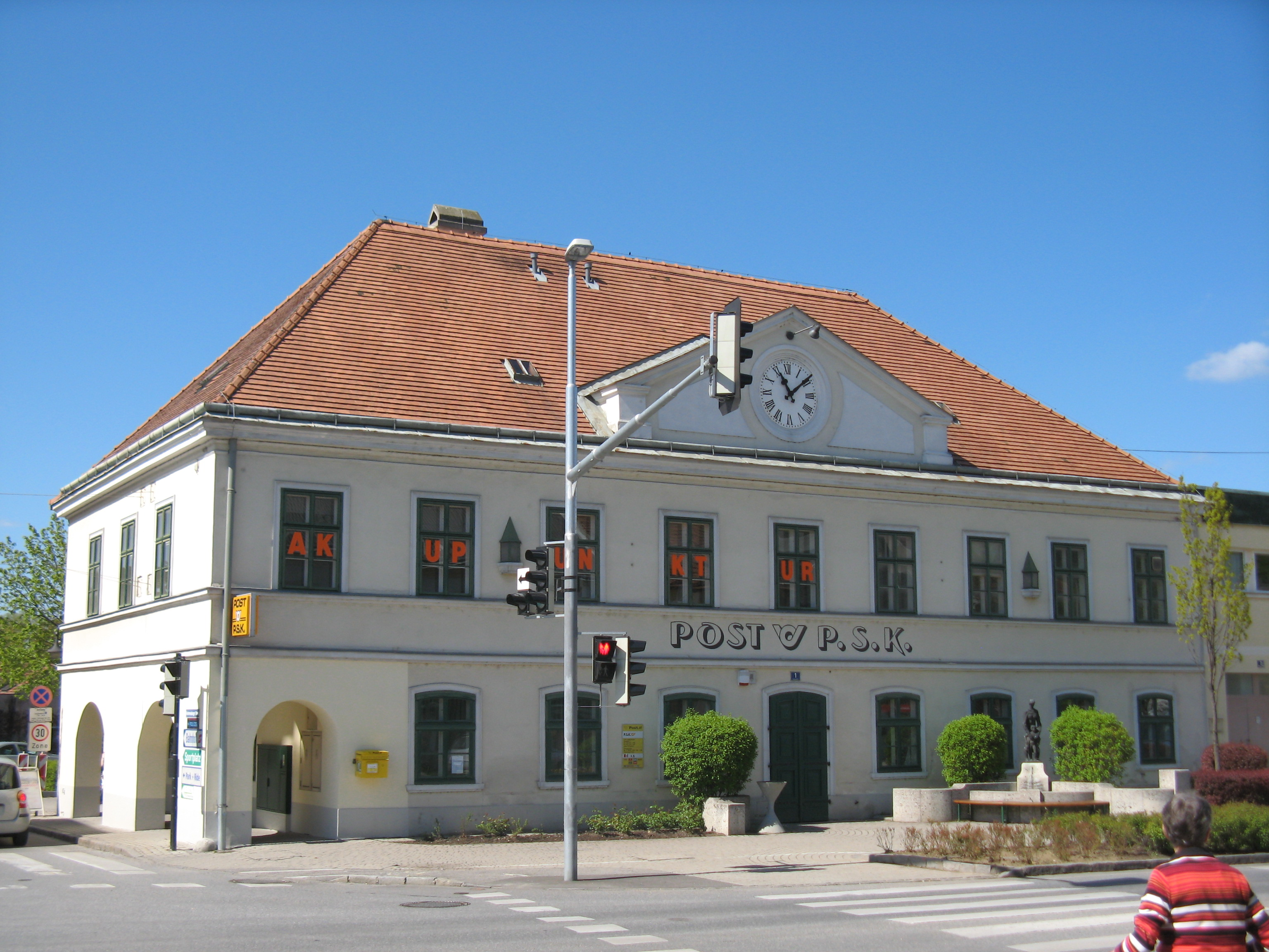 Ehemaliges Gemeindeamt (2. Viertel 19. Jh.), Langenzersdorf, Niederösterreich